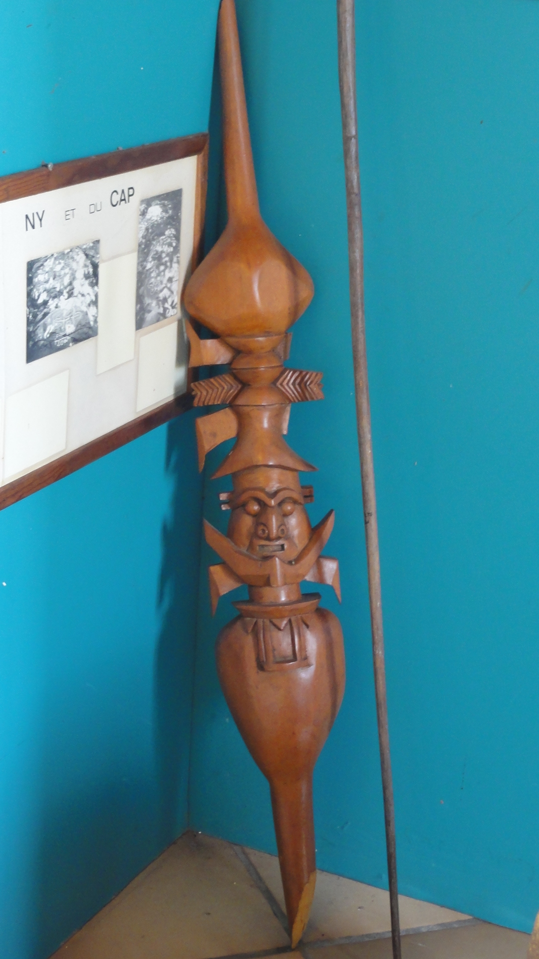 Musée de Bourail